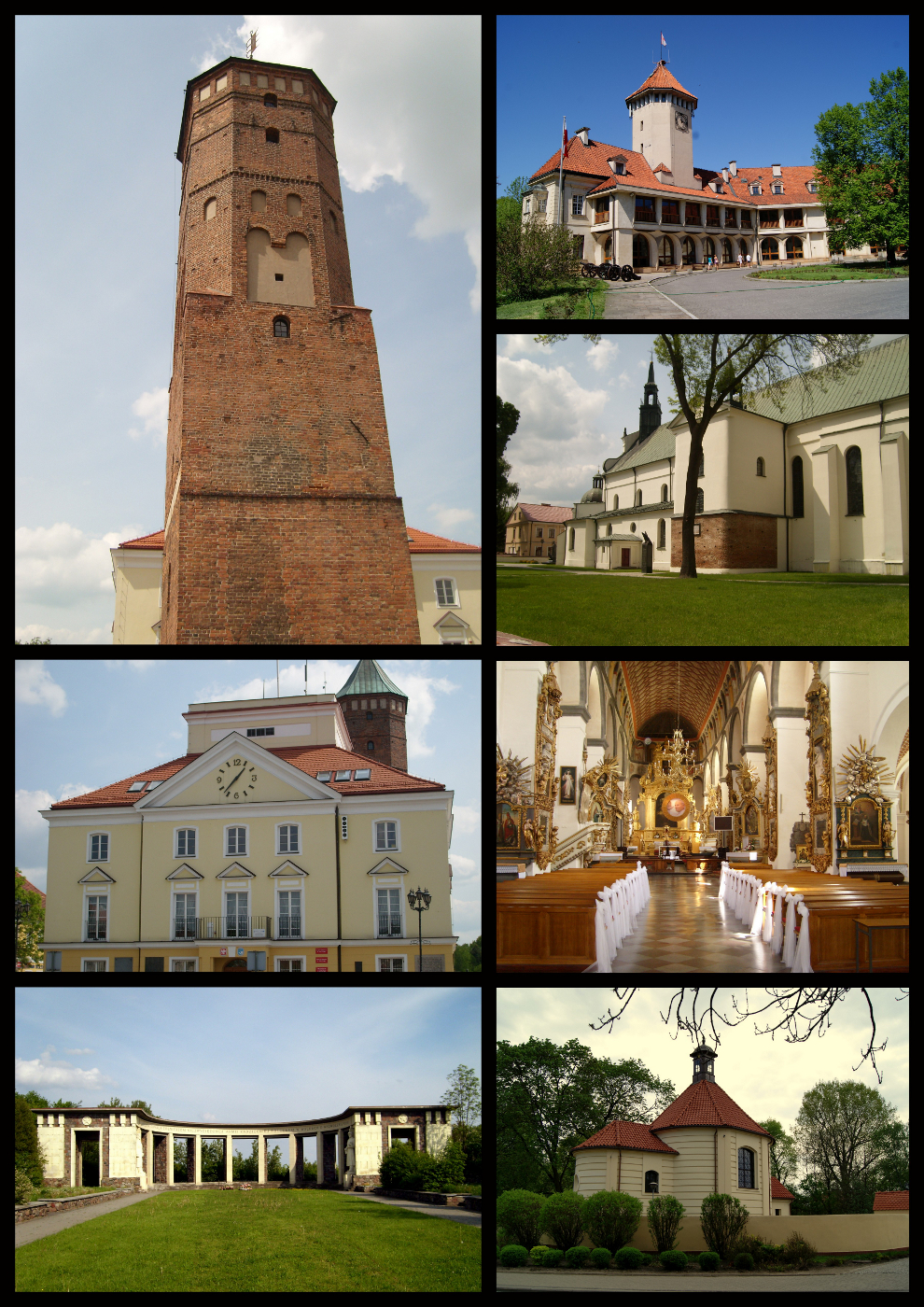 Na zdjęciu: (od lewej do dołu) Wieża ratuszowa, Ratusz, Cmentarz Radziecki w Kleszewie, (od prawej do dołu) Zamek - Dom Polonii, Bazylika, Wnętrze Bazyliki, Kaplica Świętej Marii Magdaleny